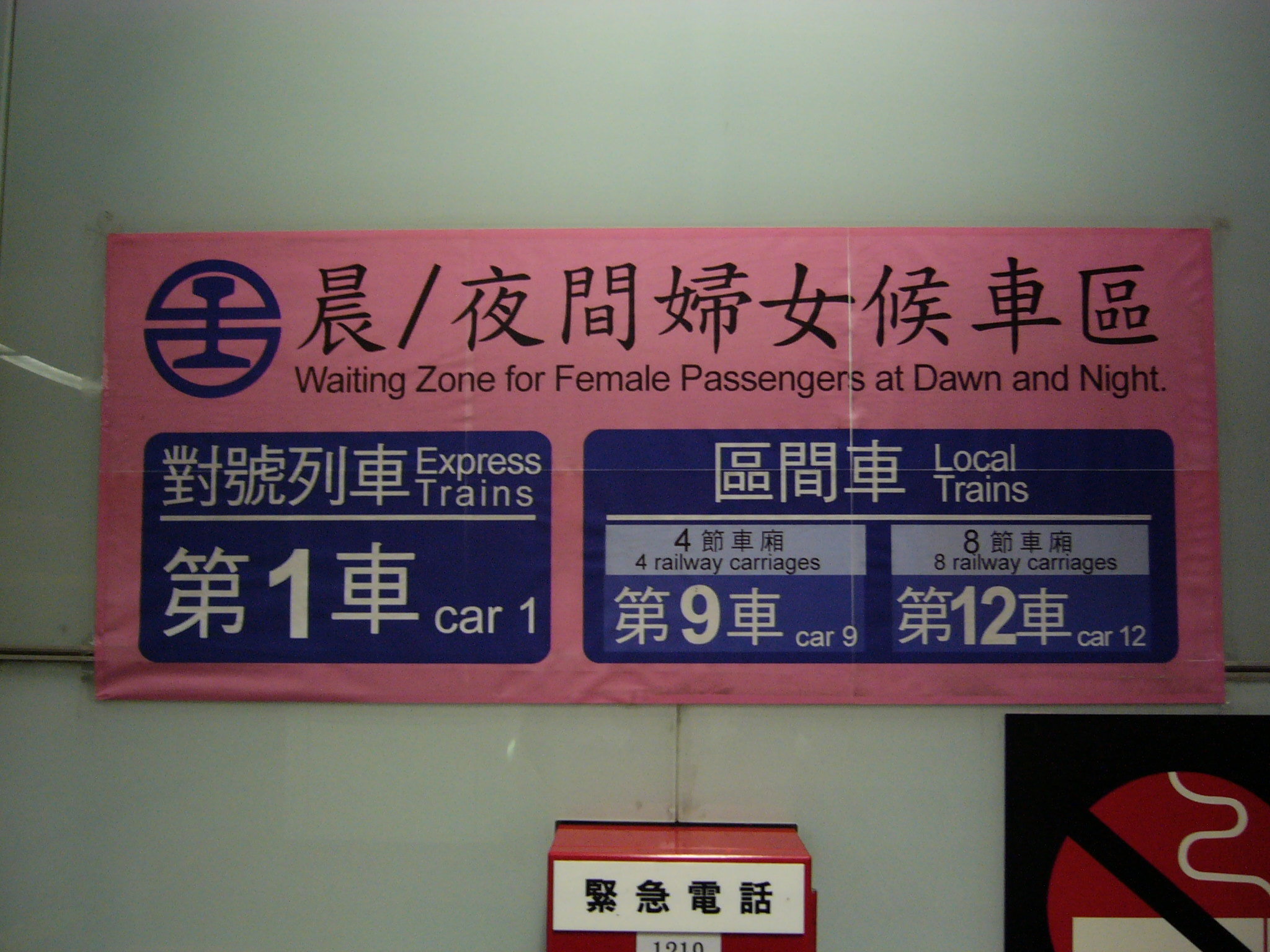 臺灣鐵路管理局松山車站第二月台，晨/夜間婦女候車區標示紙。